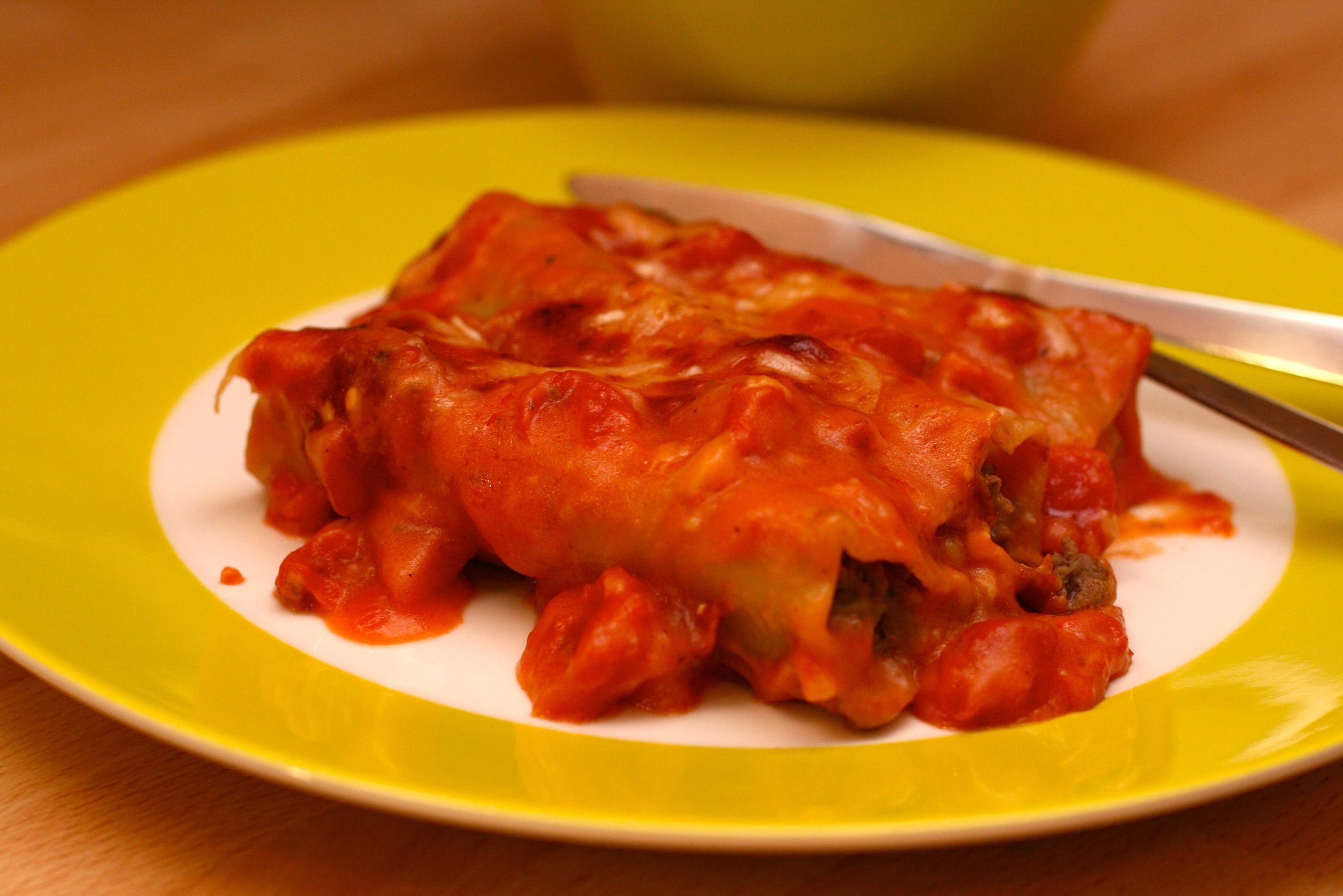 Canelones com carne picada.